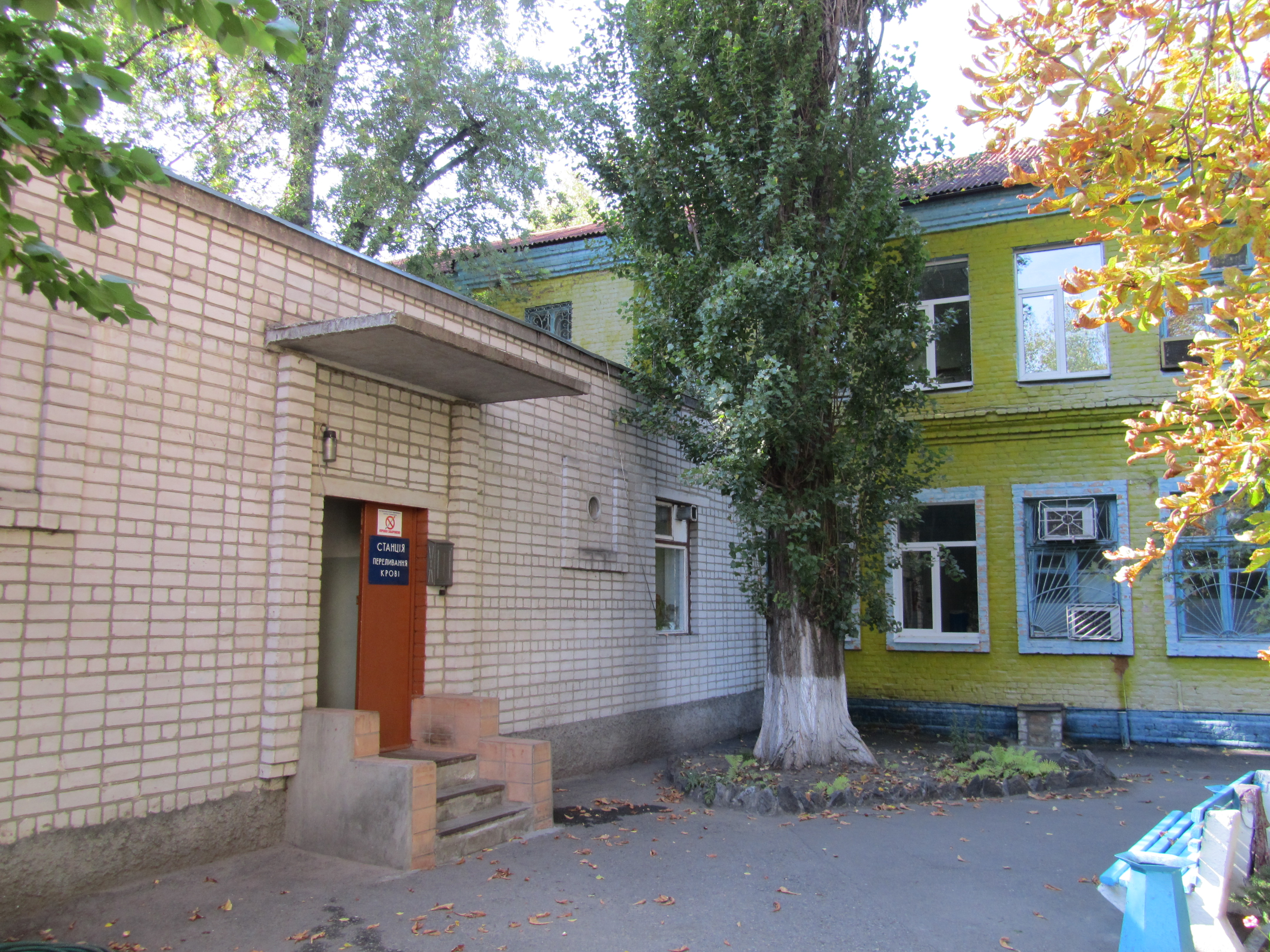 Кременчуцька станція переливання крові - Внутрішній дворик